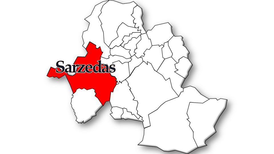 População